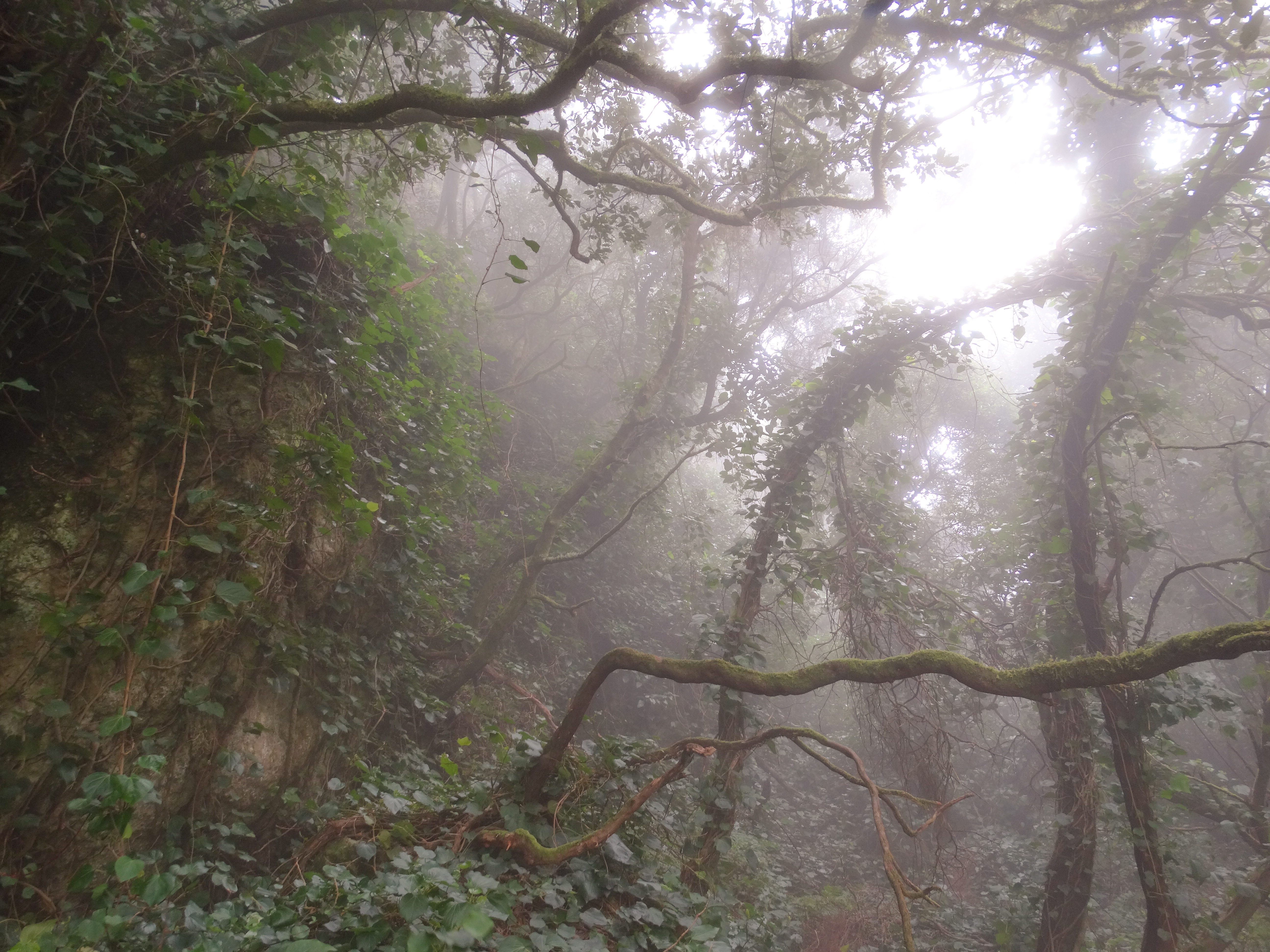 Bosque nuboso en el lado del este del Cumbre Vieja This is a photography of a Site of Community Importance in Spain with the ID: ES7020011. Natura2000 entry, EEA entry